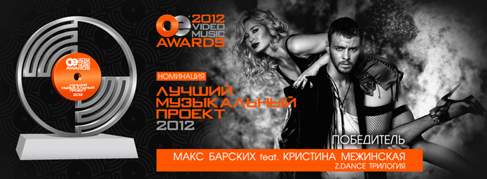 Номинация ЛУЧШИЙ МУЗЫКАЛЬНЫЙ ПРОЕКТ ГОДА